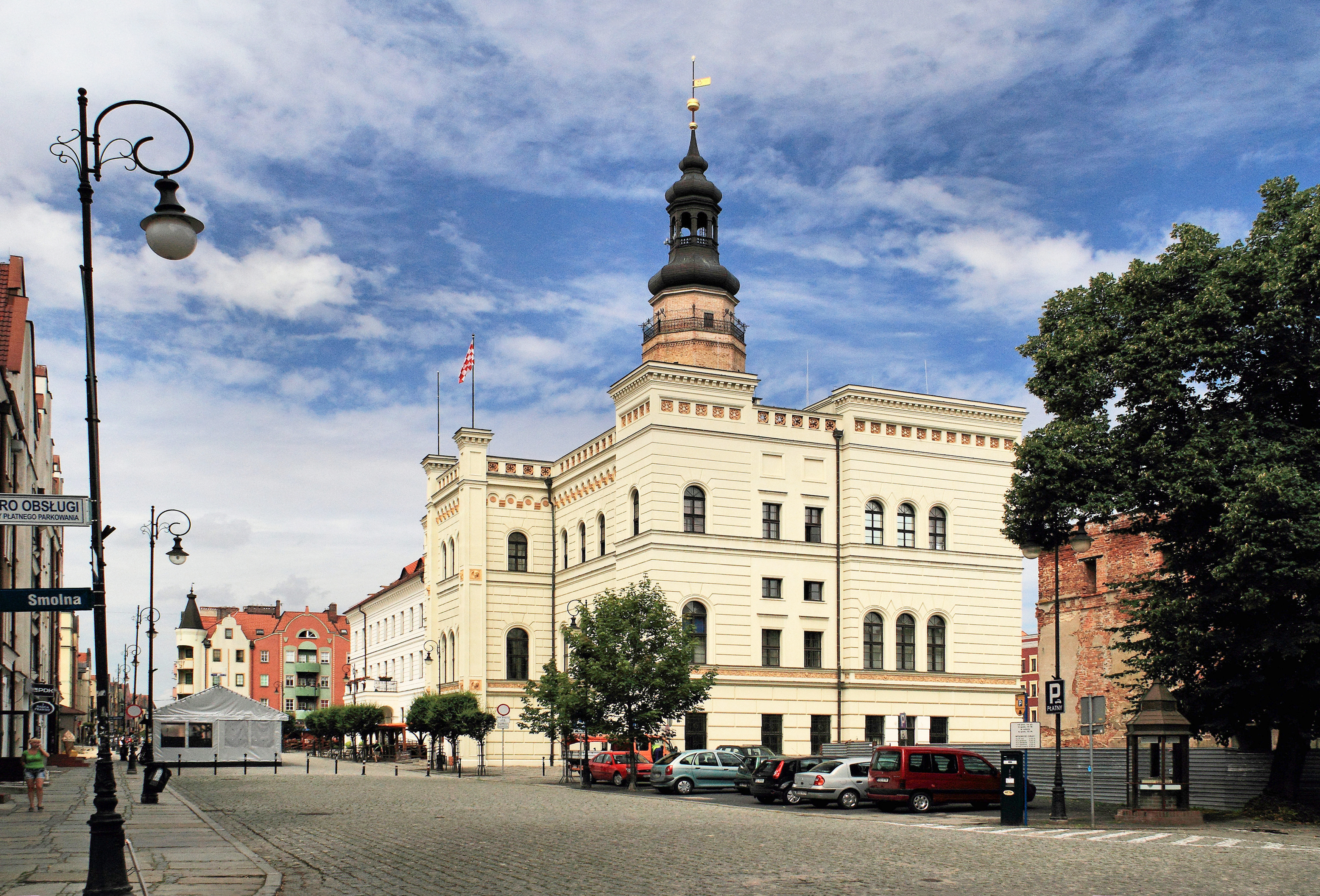 Głogów - Ratusz